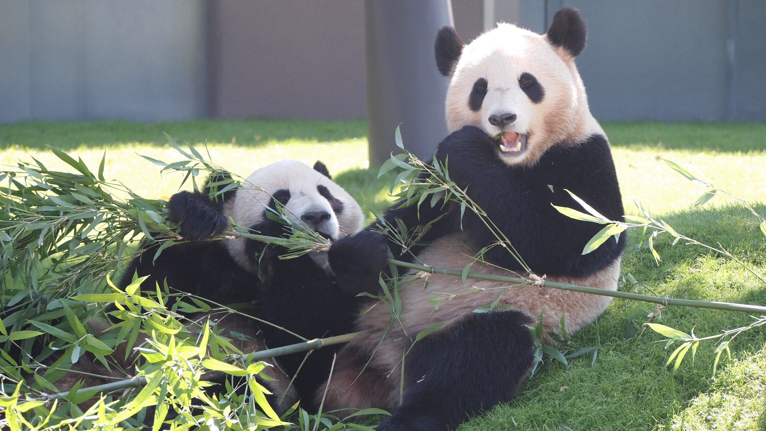 日本国和歌山県白浜町アドベンチャーワールドのジャイアントパンダ海浜と陽浜